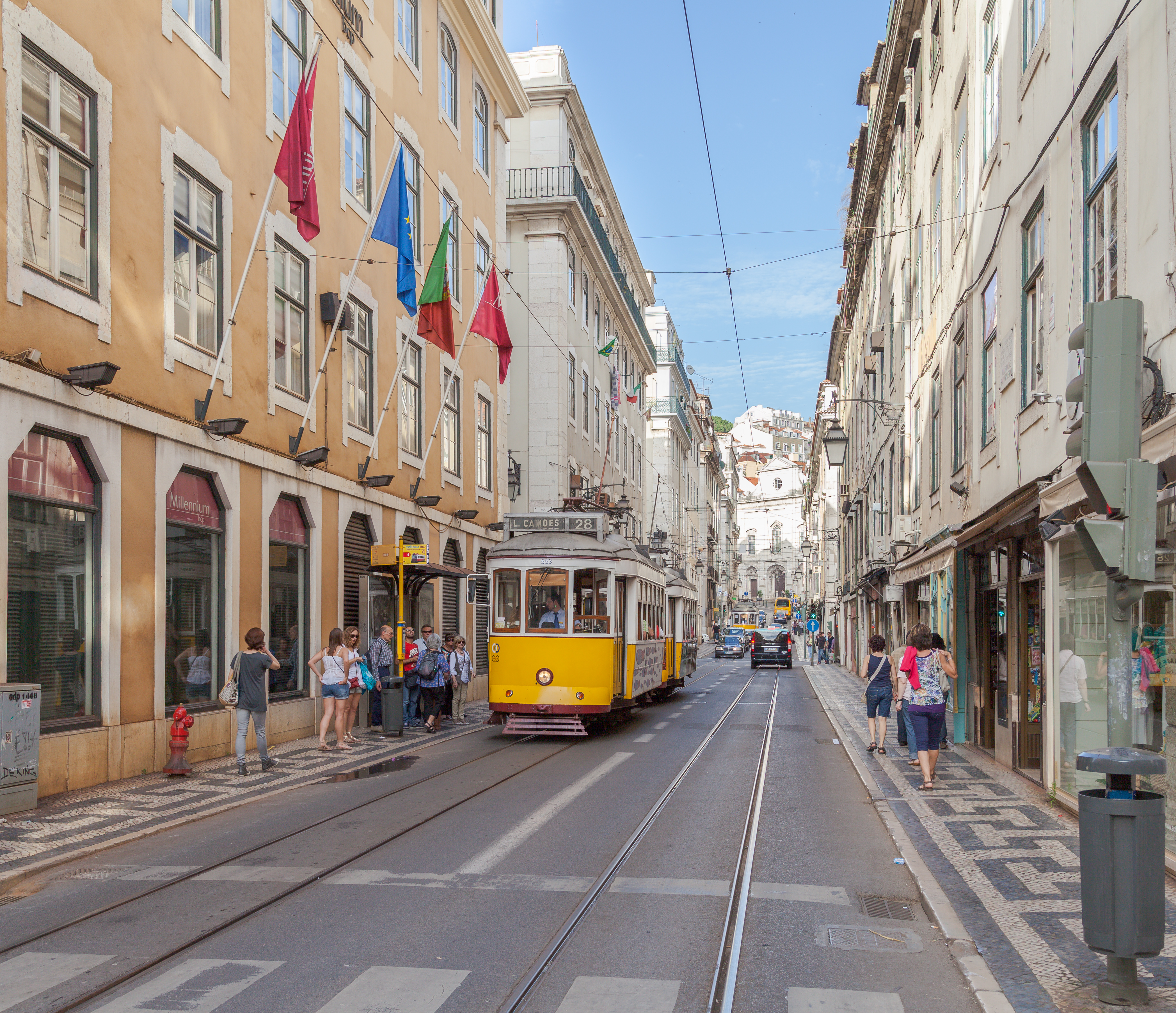 Tranvía 553 en Rua da Conceição, Lisboa, Portugal